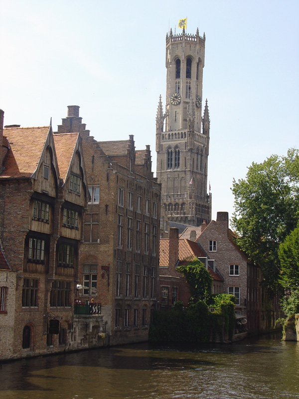 Canal at Rozenhoedkaai, Bruges, Belgium. 07-2006